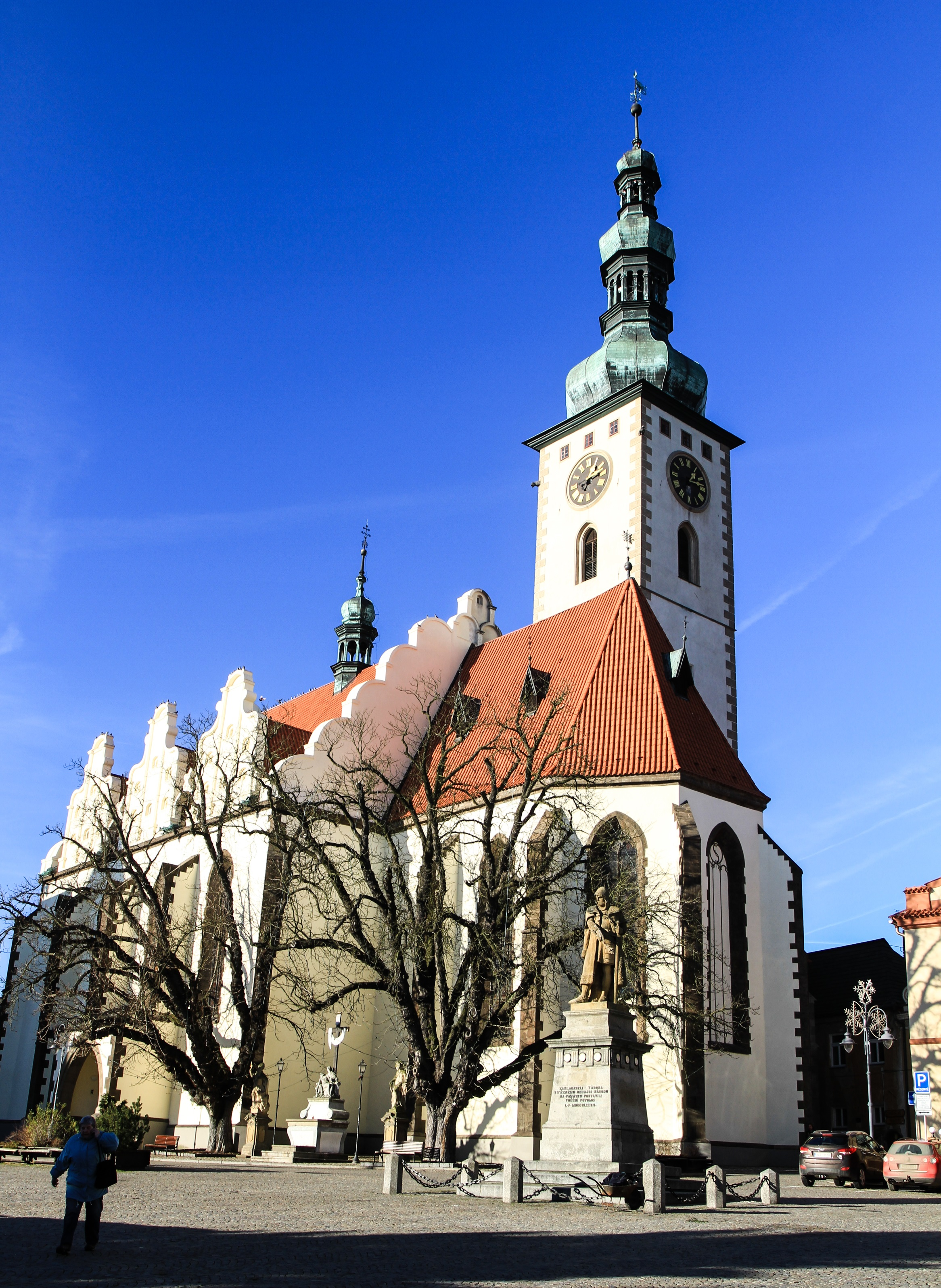 Kostel Proměnění Páně na hoře Tábor, nám. Žižkovo, Tábor, Tábor.